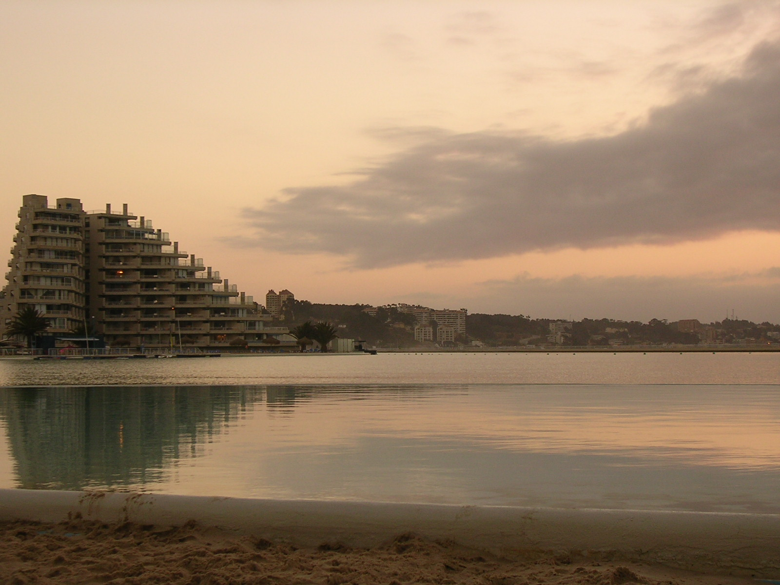 Complejo residencial San Alfonso del Mar, en Algarrobom, Chile, que posee la piscina más grande del mundo.